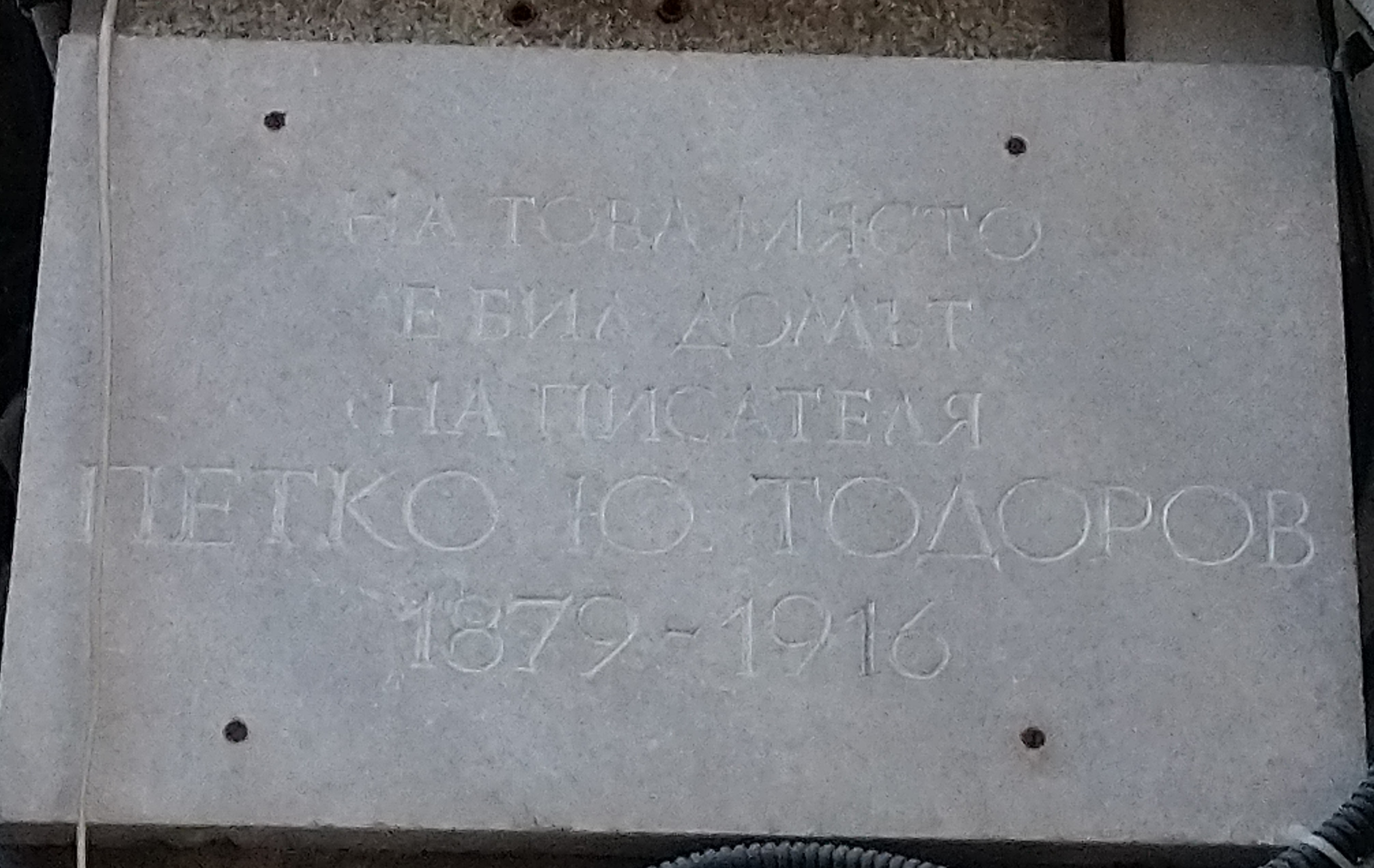 Паметна плоча на писателя Петко Ю. Тодоров, бул. Витоша 65, София